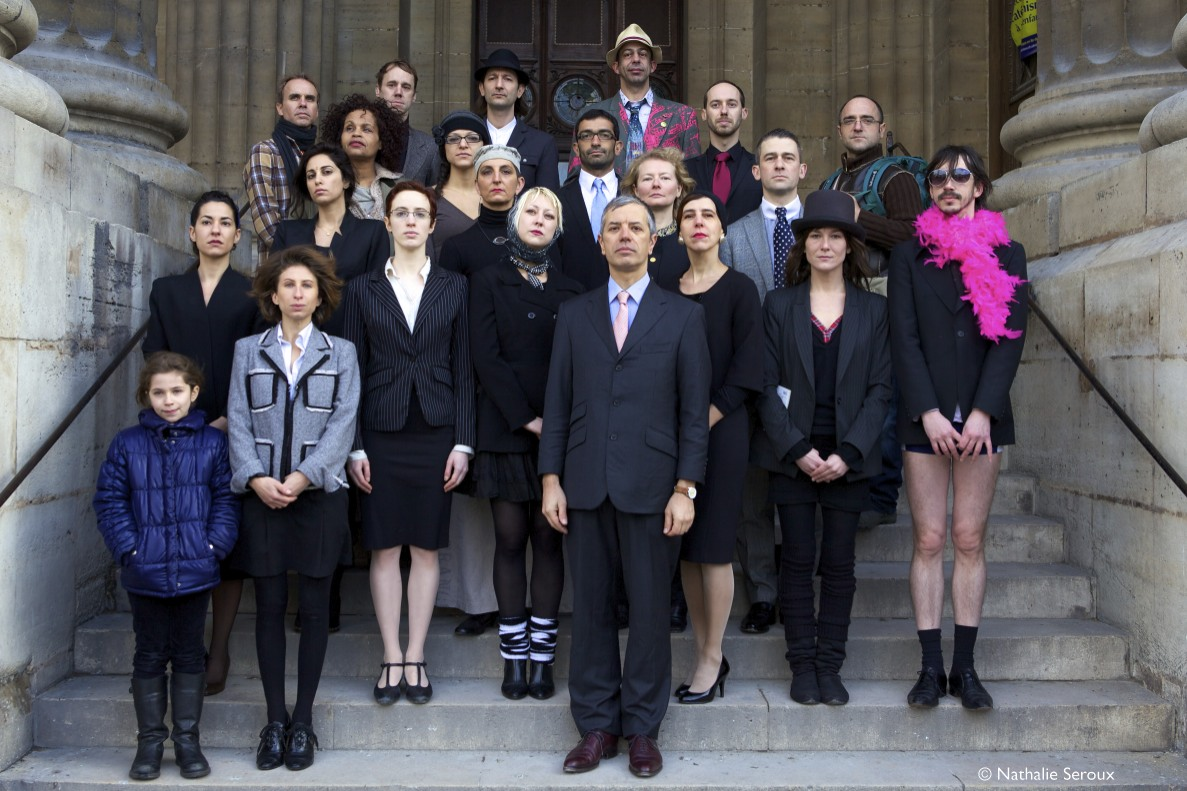 Gaspard Delanoë présente son gouvernement.